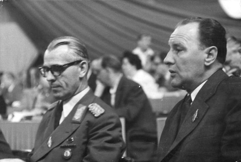 Zentralbild Heilig 12.7.1958. V. Parteitag der SED vom 10. bis 16.7.1958 in der Werner-Seelenbinder-Halle, Berlin. 5. Tag: UBz.: Im Präsidium: Generaloberst Willi Stoph, Mitglied des Politbüros des ZK der SED (links) und Janas Kadar, Erster Sekretär des ZK der Ungarischen Sozialistischen Arbeiterpartei.